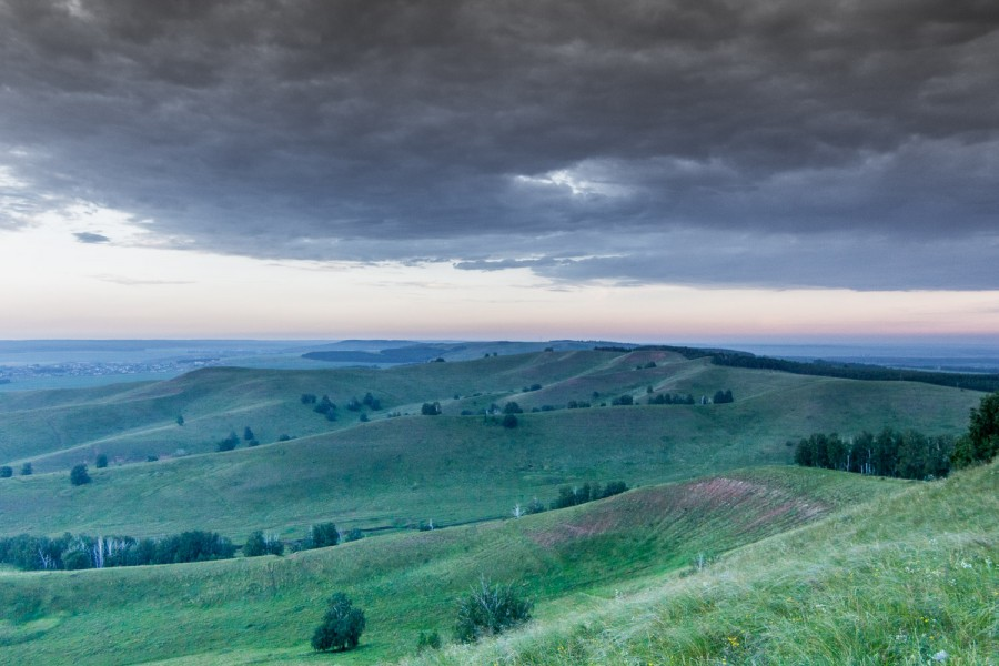 Альметьевский заказник: Альметьевский район, Татарстан This image is related to the protected area of Russia number 1610022